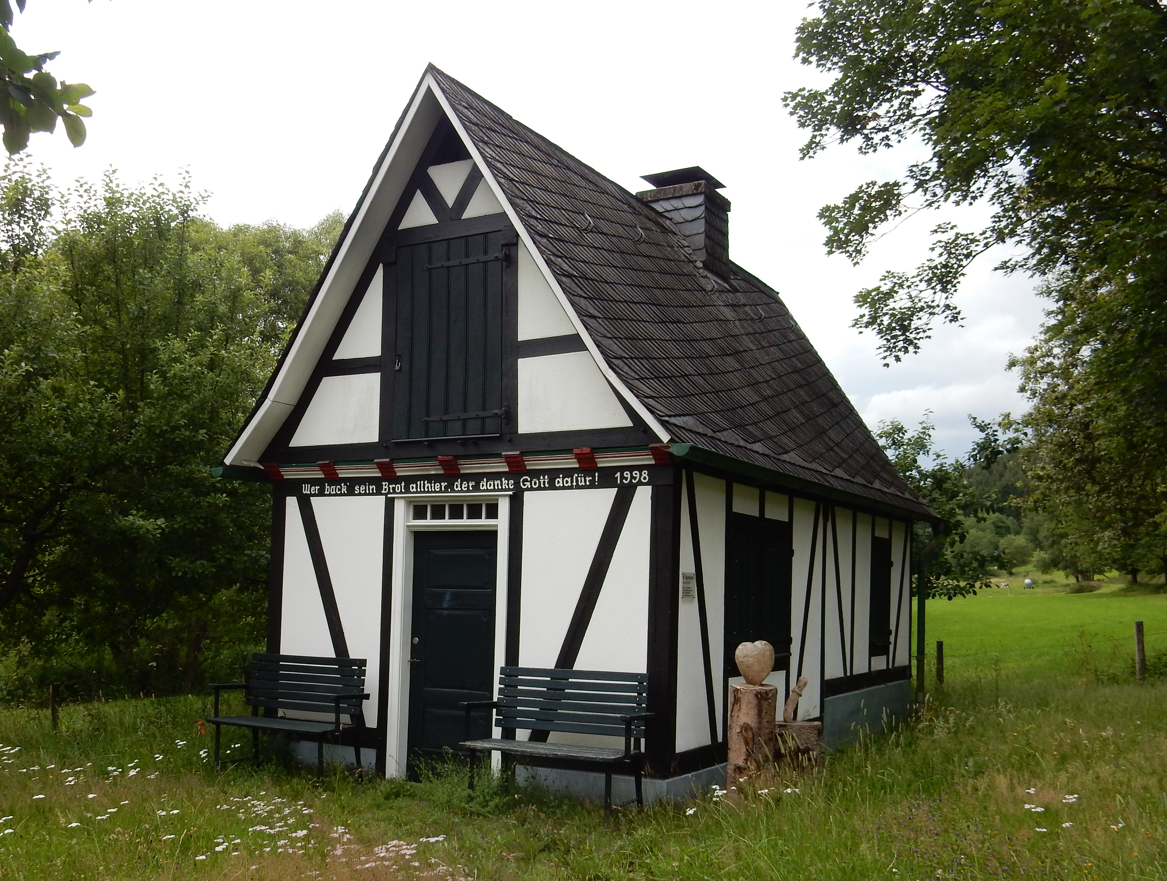 Backhaus in Langenholdinghausen